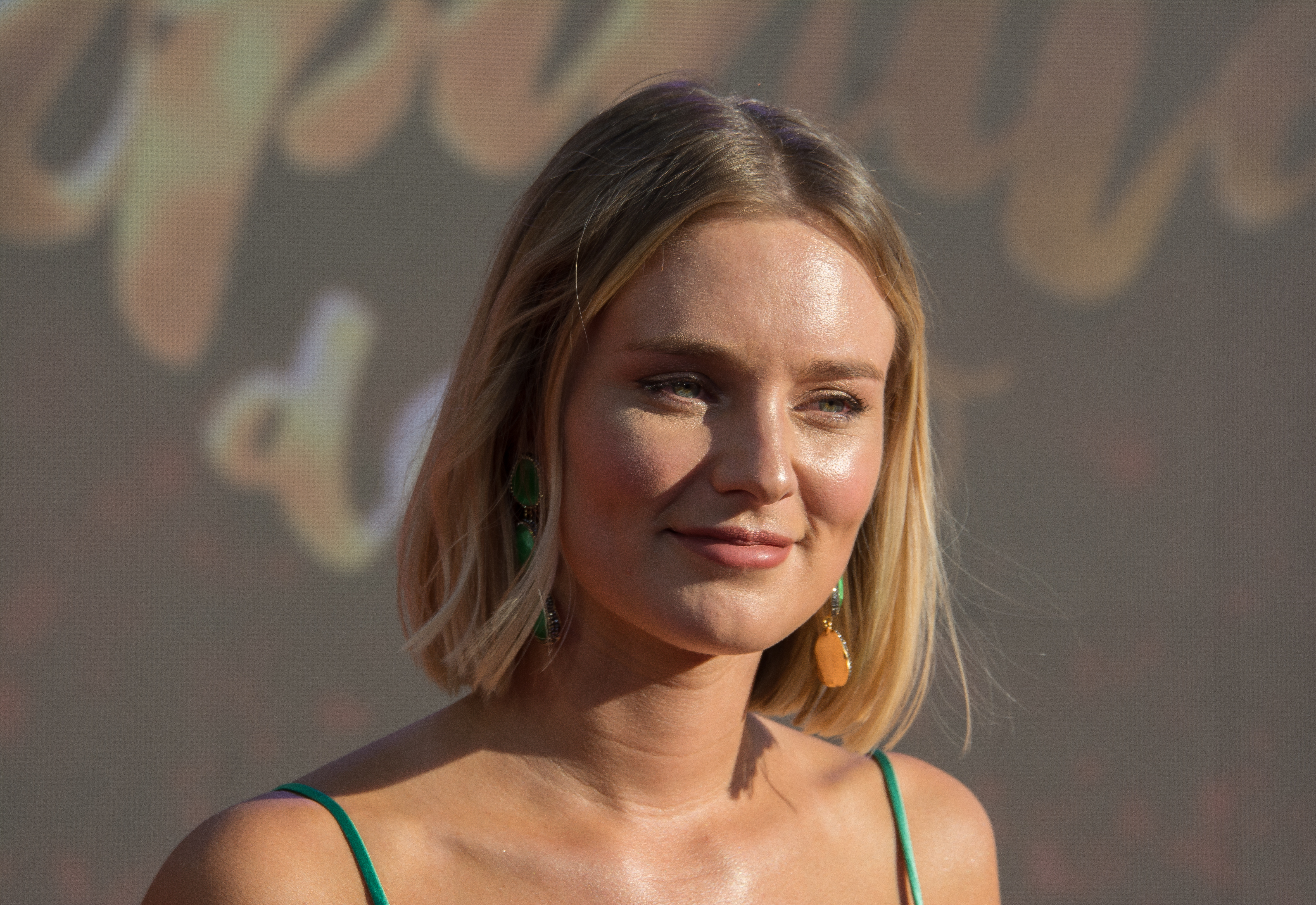 Kika Silva, Copihue de Oro 2018, Sun Monticello, Mostazal, Región de O'Higgins, Chile